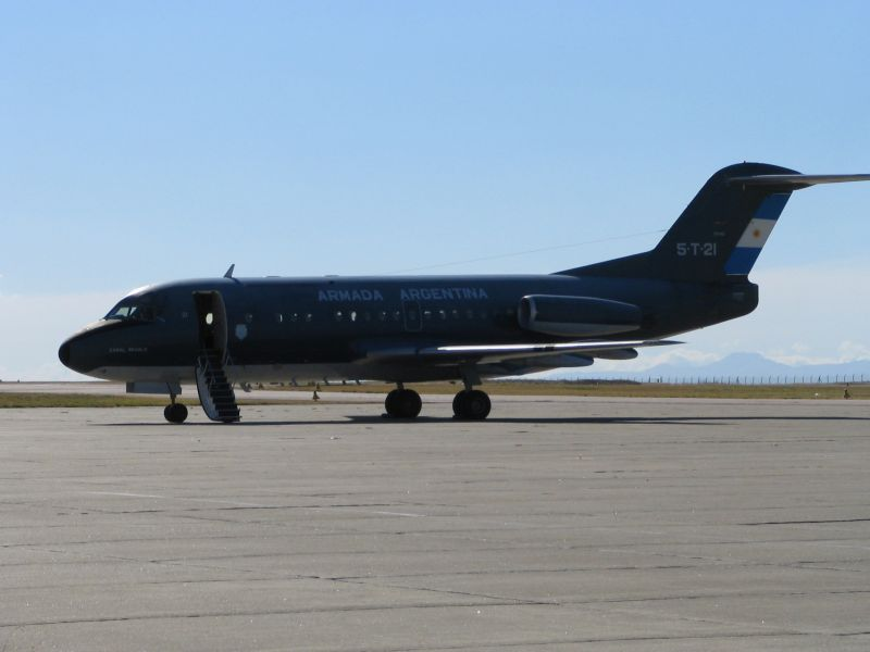 F-28 5-T-21 Comando de Aviación Naval - Armada Argentina Martín Otero Base Aérea Comandante Espora May 17, 2005 - Navy´s Day